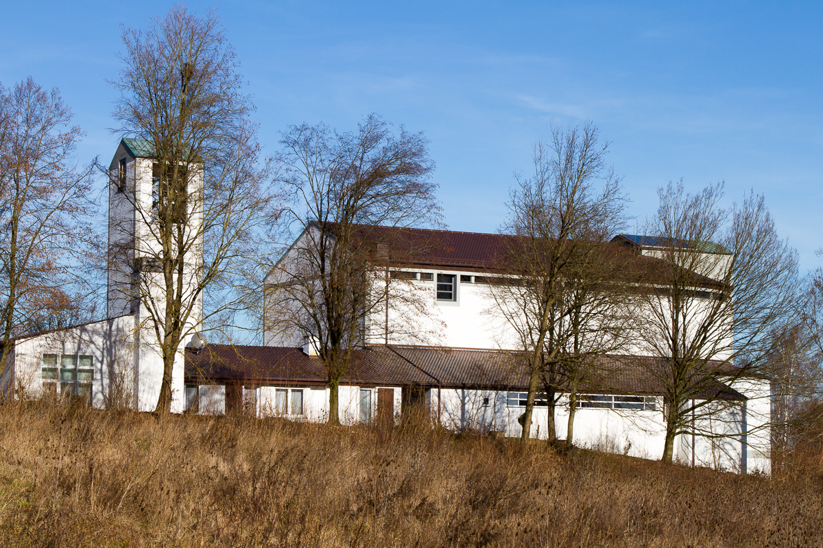 Katholische Pfarrkirche Verklärung Christi auf dem Berge verputzter Betonbau mit Flachsatteldach und halbrundem Chorschluss im Osten, Saalkirche mit offenem Dachstuhl, Umgang und kryptenartiger Unterkirche, mit Pfarrhaus über Vor- und Innenhof mit Glockenturm verbunden, von Alexander Freiherr von Branca, 1959-61; mit AusstattungThis is a photograph of an architectural monument.